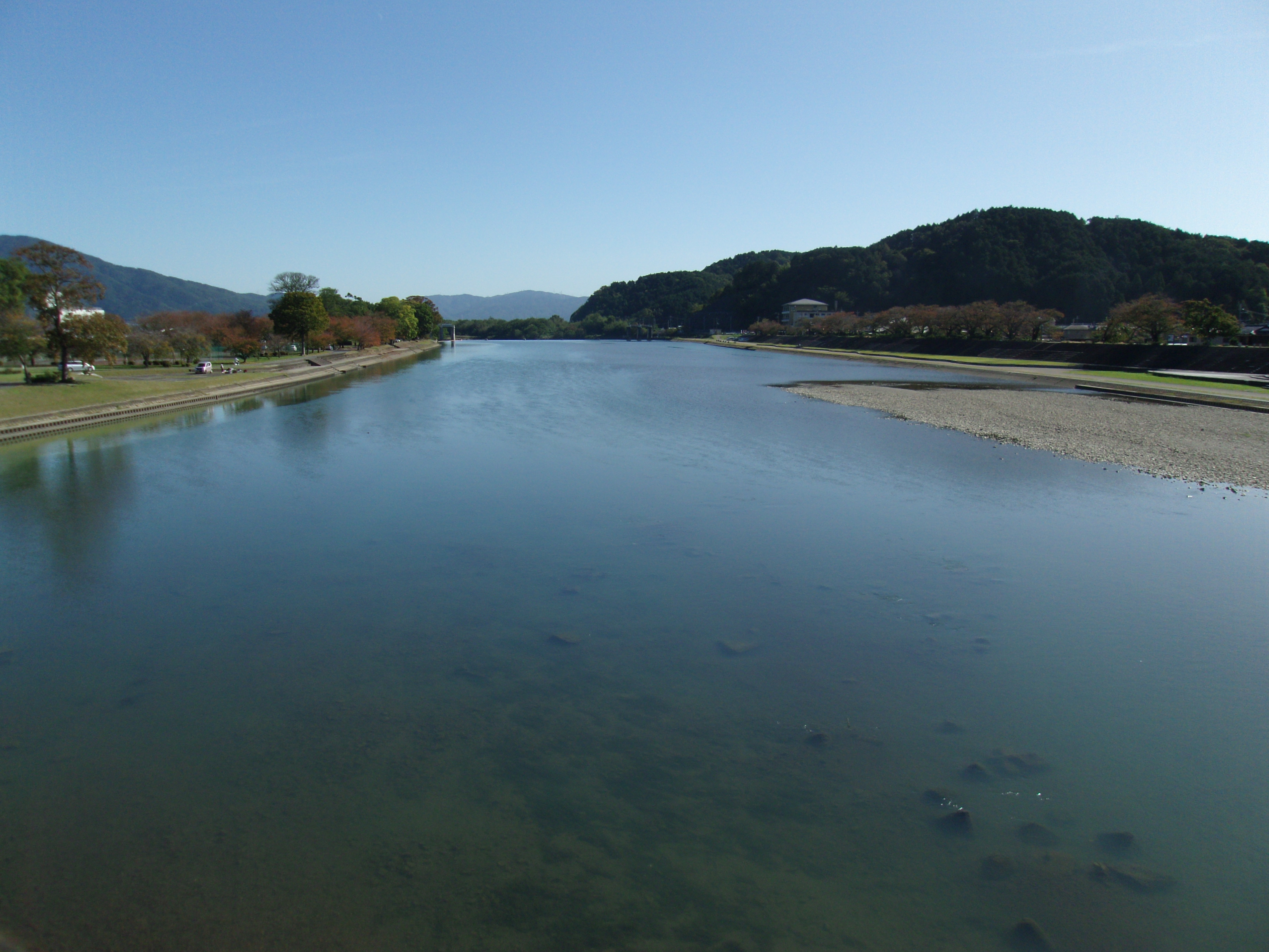 南丹市八木町を流れる桂川